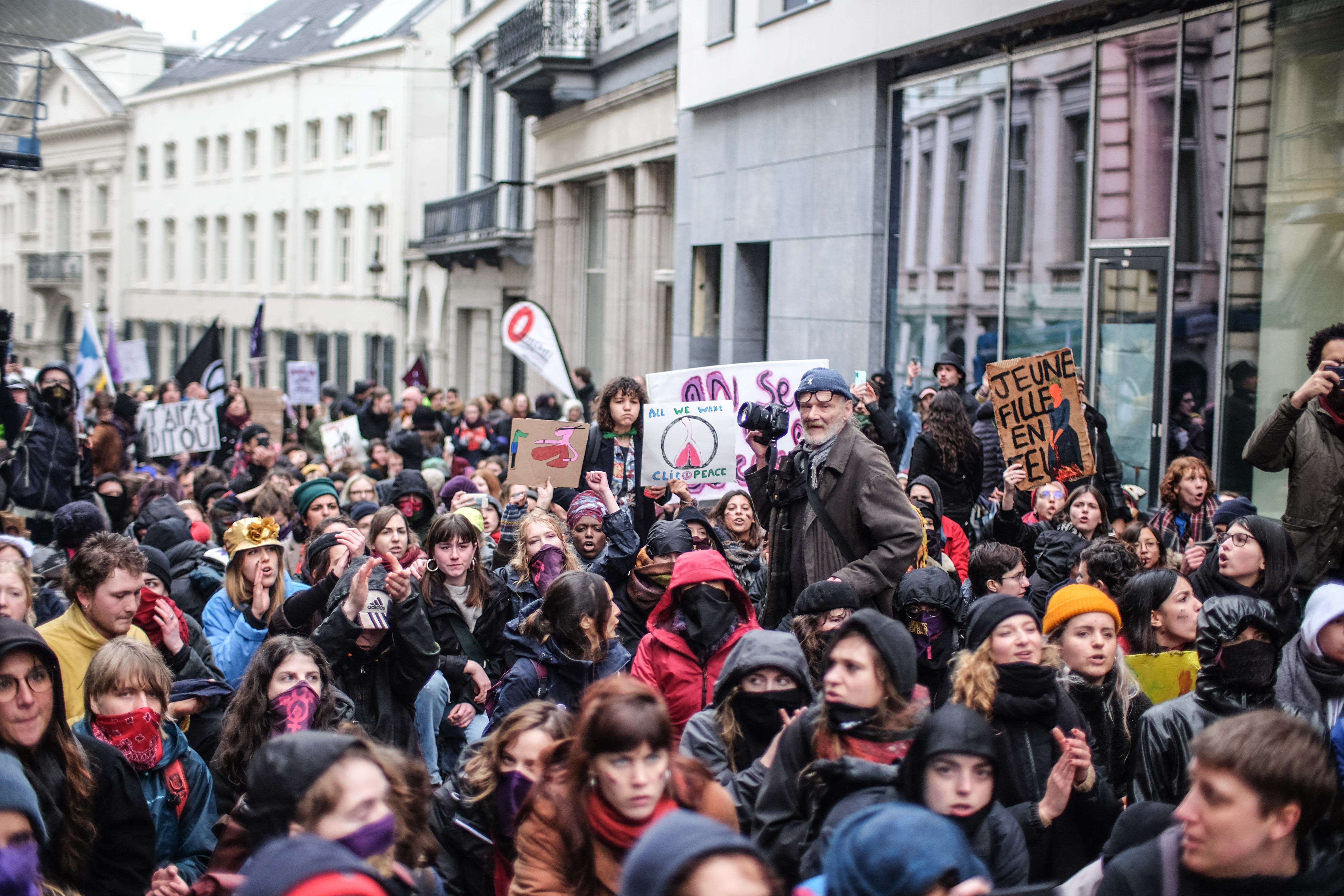 March in Brussels